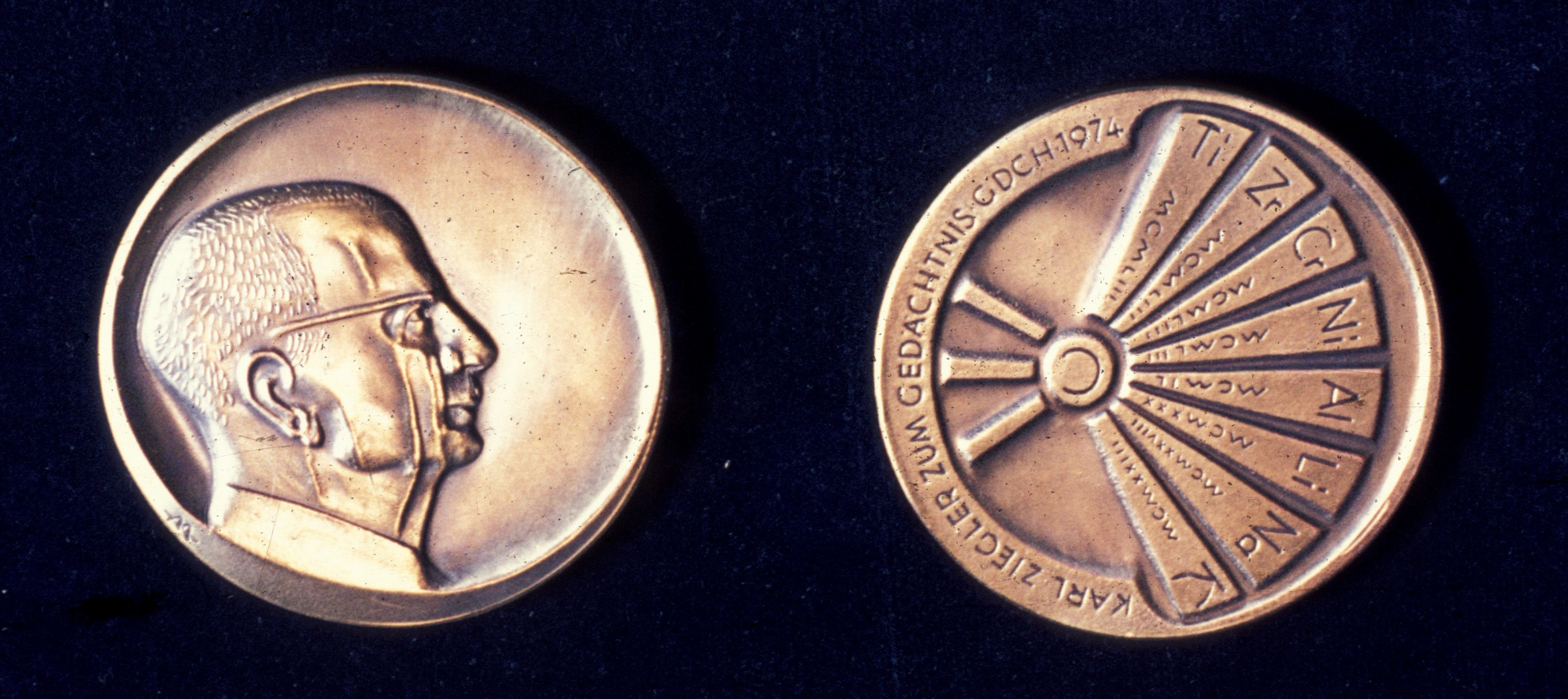 Abbildung der Medaille (Vor- und Rückseite)